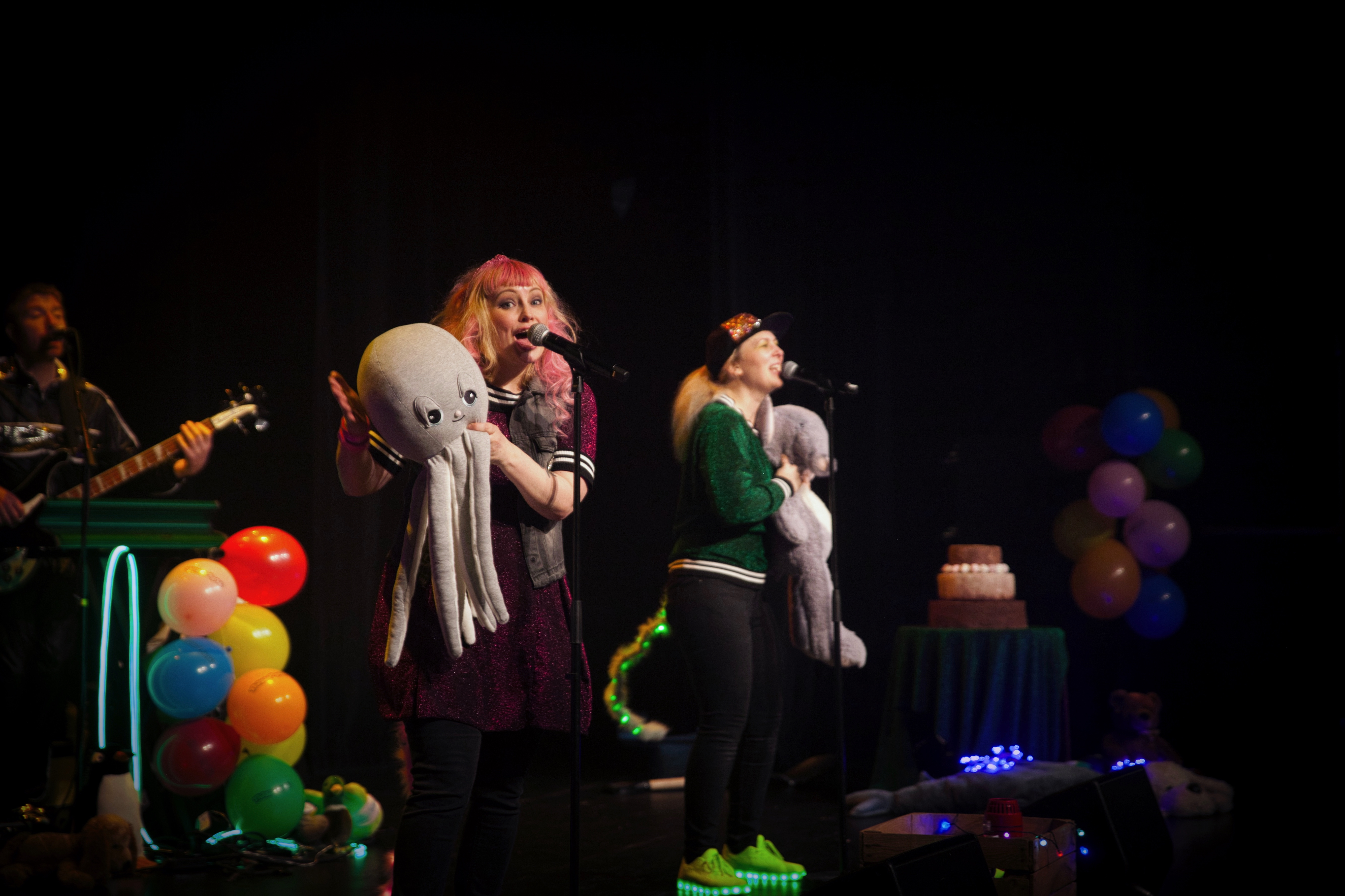 Foto: Kjetil Rostad